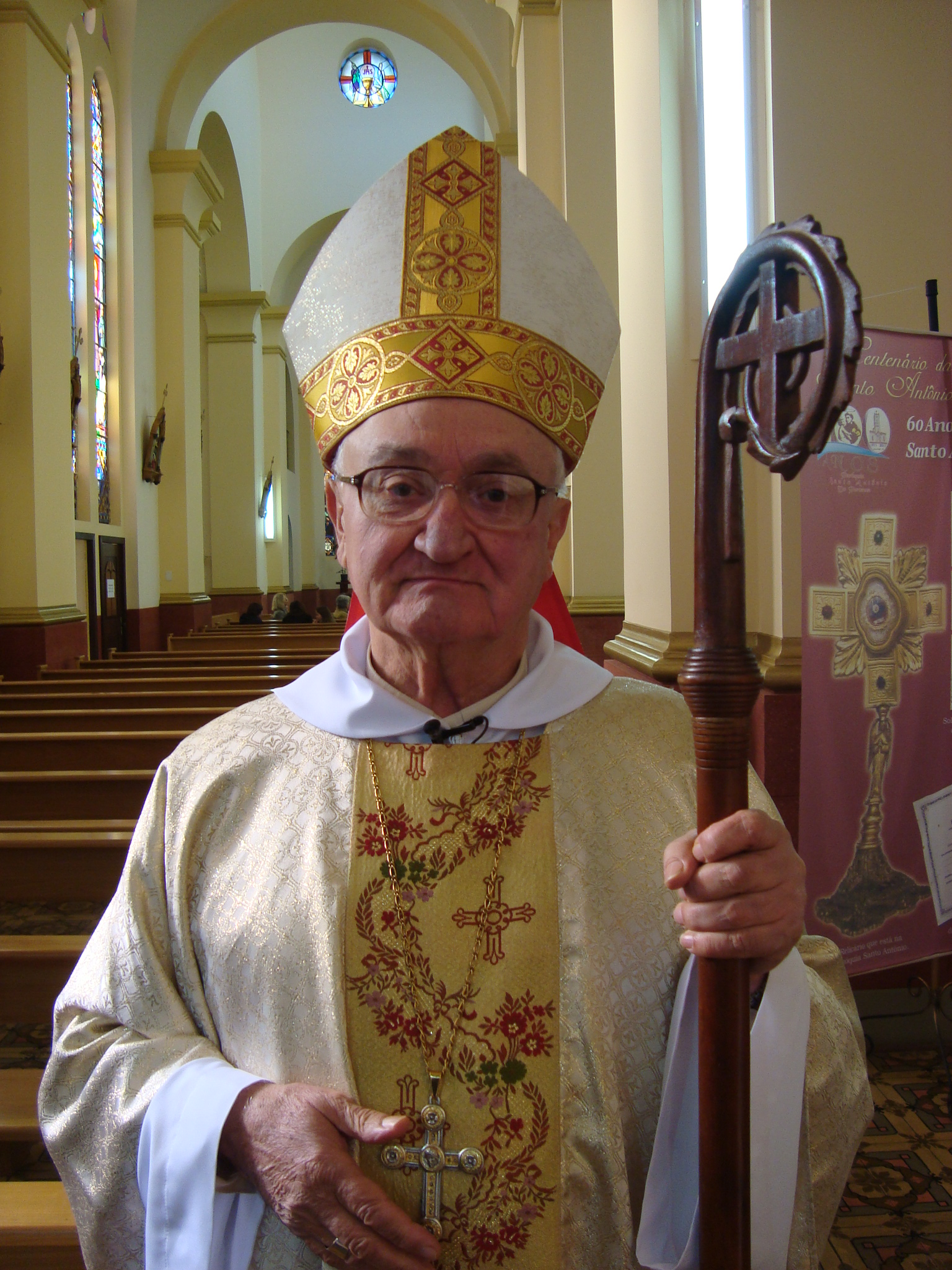 Arcebispo Emérito de Juiz de Fora, Minas Gerais, Brasil.